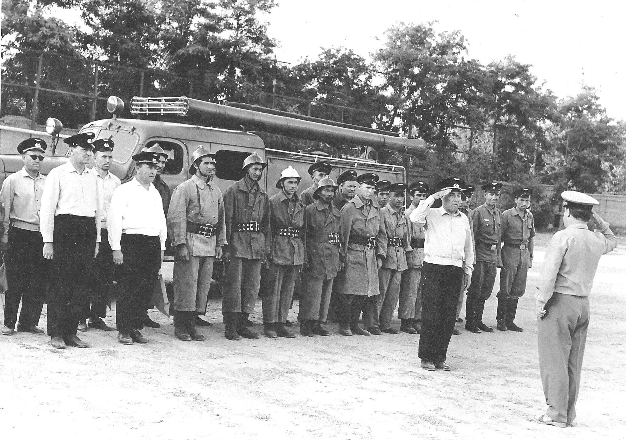 Работники пожарных подразделений военизированной охраны Ташкентской железной дороги Министерства путей сообщения СССР на построении по случаю проведения соревнований по пожарно-прикладному спорту. Место съемки - г. Ташкент. Докладывает старший инструктор по пожарно-технической части отдела военизированной охраны М.Шатилов